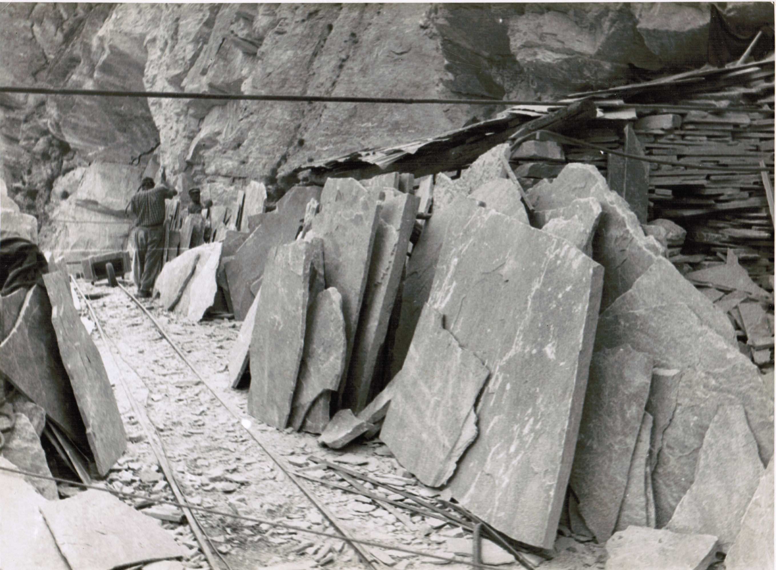 Quarzitplattenbrüche Lochmatter, St. Niklaus Schweizer Kanton Wallis, Spalten der Blöcke.